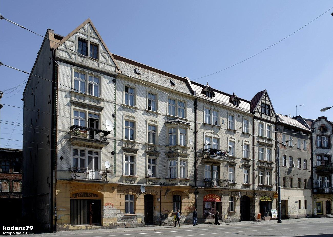 Gliwicka 77-79